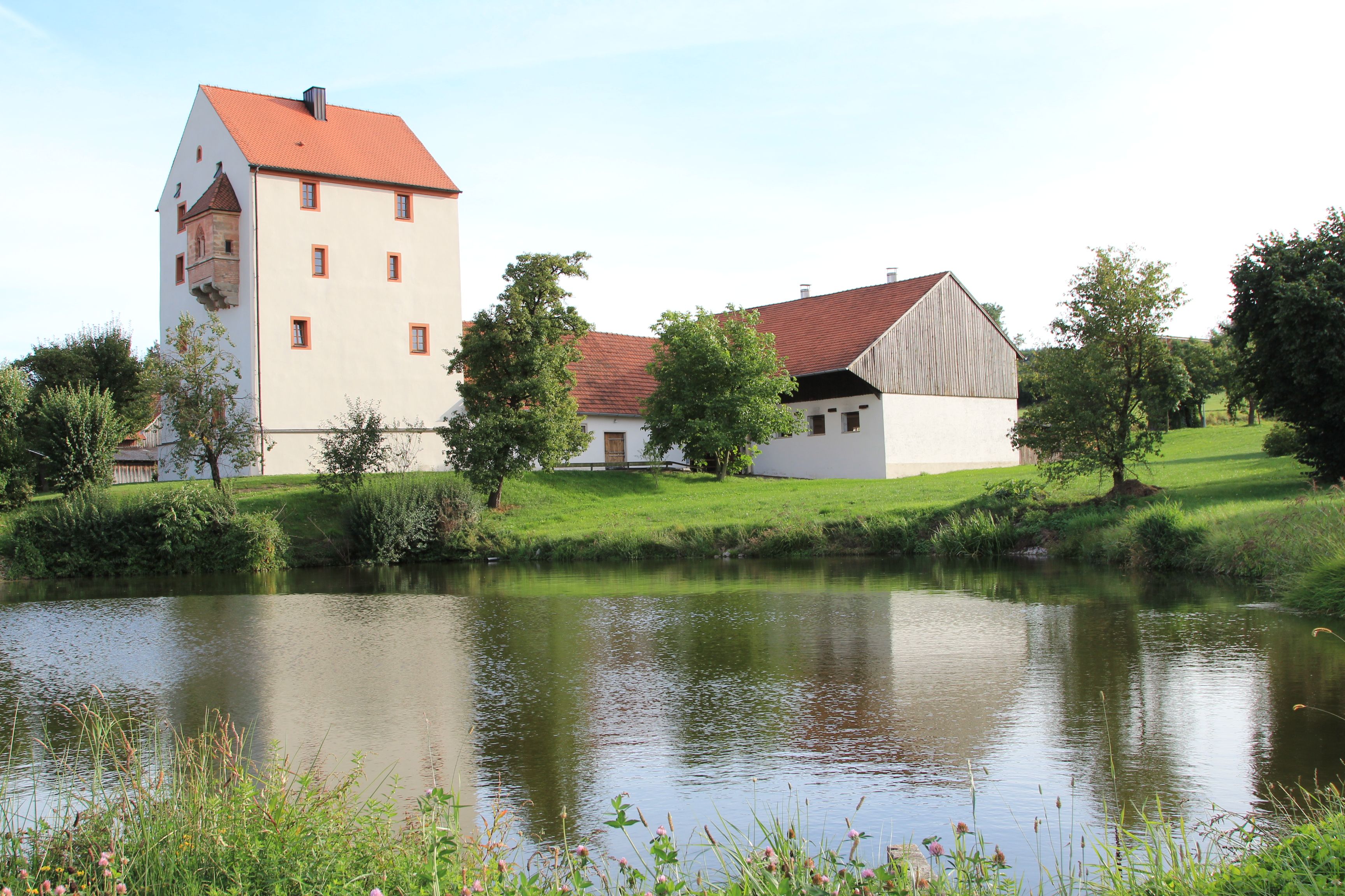 Pettendorf, Stadt Neunburg vorm Wald, Landkreis Schwandorf, Oberpfalz, Bayern; In Pettendorf befindet sich der Stammsitz der Herren von Pettendorf, ein spätgotisches Turmschlösschen. Ursprünglich war es von einer Ringmauer und einem Wassergraben umgeben. Die Ringmauer wurde 1850 abgebrochen. Nach einem Brand im Jahre 1892 wurde der Dachstuhl erneuert. In den sechziger Jahren des 20. Jahrhunderts wurde das Schlösschen restauriert. Es hat an der Ostseite einen auf drei Konsolen ruhenden gotischen Erker mit Kreuzrippengewölbe und Maßwerkfenster.